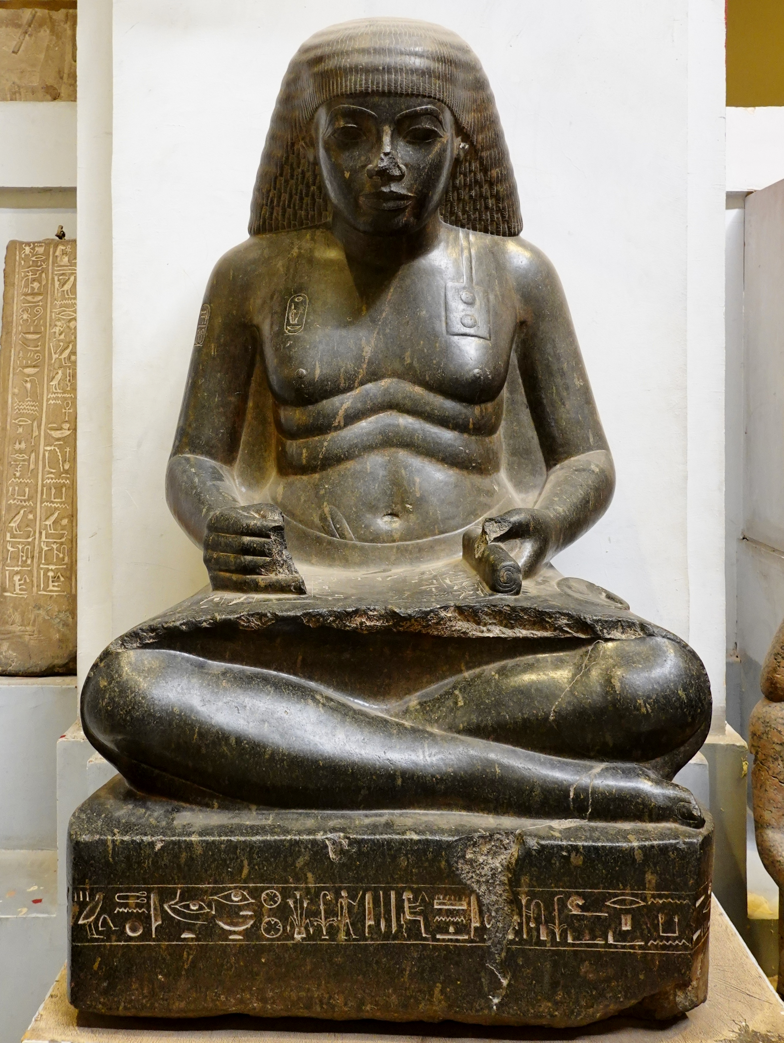 Sitzstatue des Amenophis, Sohn des Hapu, aus der Herrschaftszeit Amenophis III. (Höhe 128 cm, Granit, 18. Dynastie), gefunden 1913 durch Georges Legrain im Amun-Re-Tempel in Karnak, ausgestellt im Ägyptischen Museum in Kairo, Ägypten